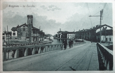 Gaggiano tram